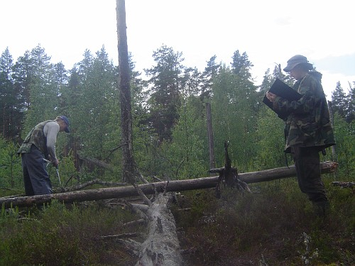 SMI töögrupp proovitükil